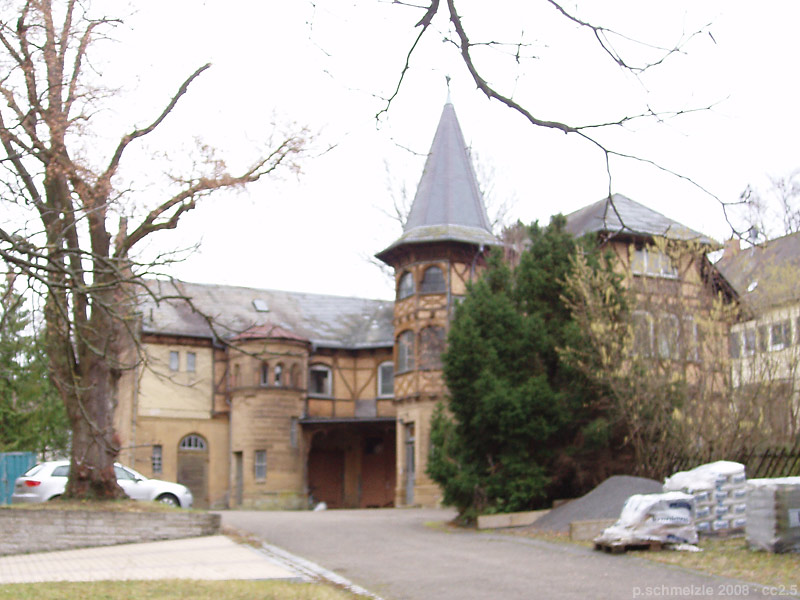 Denkmalgeschütztes Gebäude Wirtschaftsgebäude der Villa Knorr in der Bismarckstr. 50 in Heilbronn